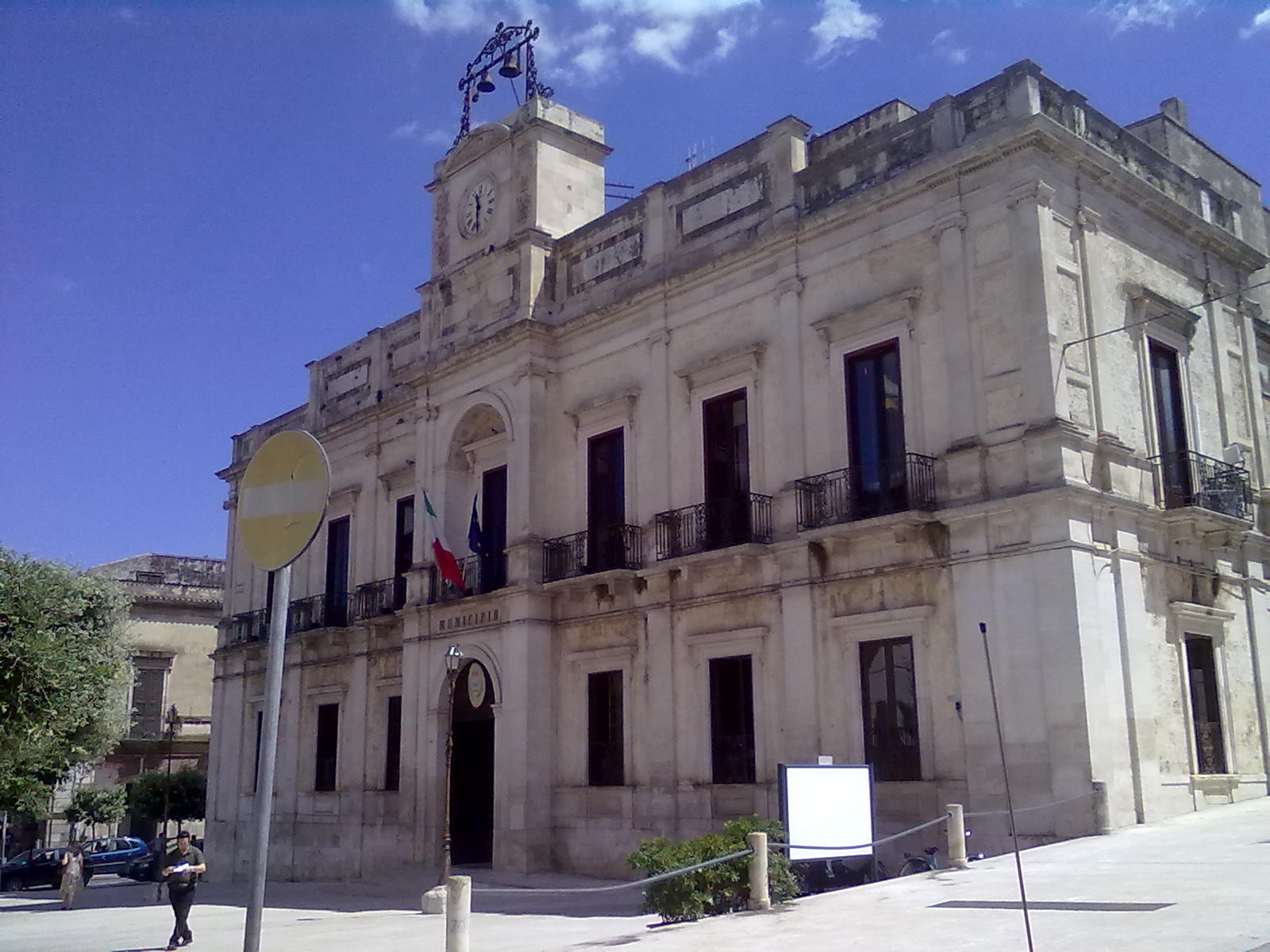 Palazzo San Domenico di Gioia del Colle, sede del Municipio Licensing Categoria: Gioia del Colle